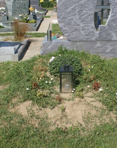 Grab Robert Opratko-Friedhof Purbach.